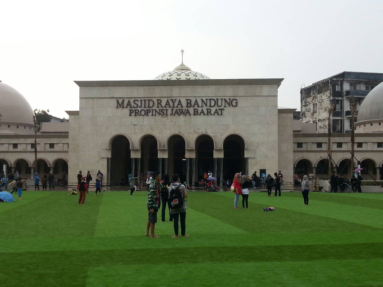 Alun-Alun Bandung dengan Masjid Raya Bandung sebagai ikon utama.